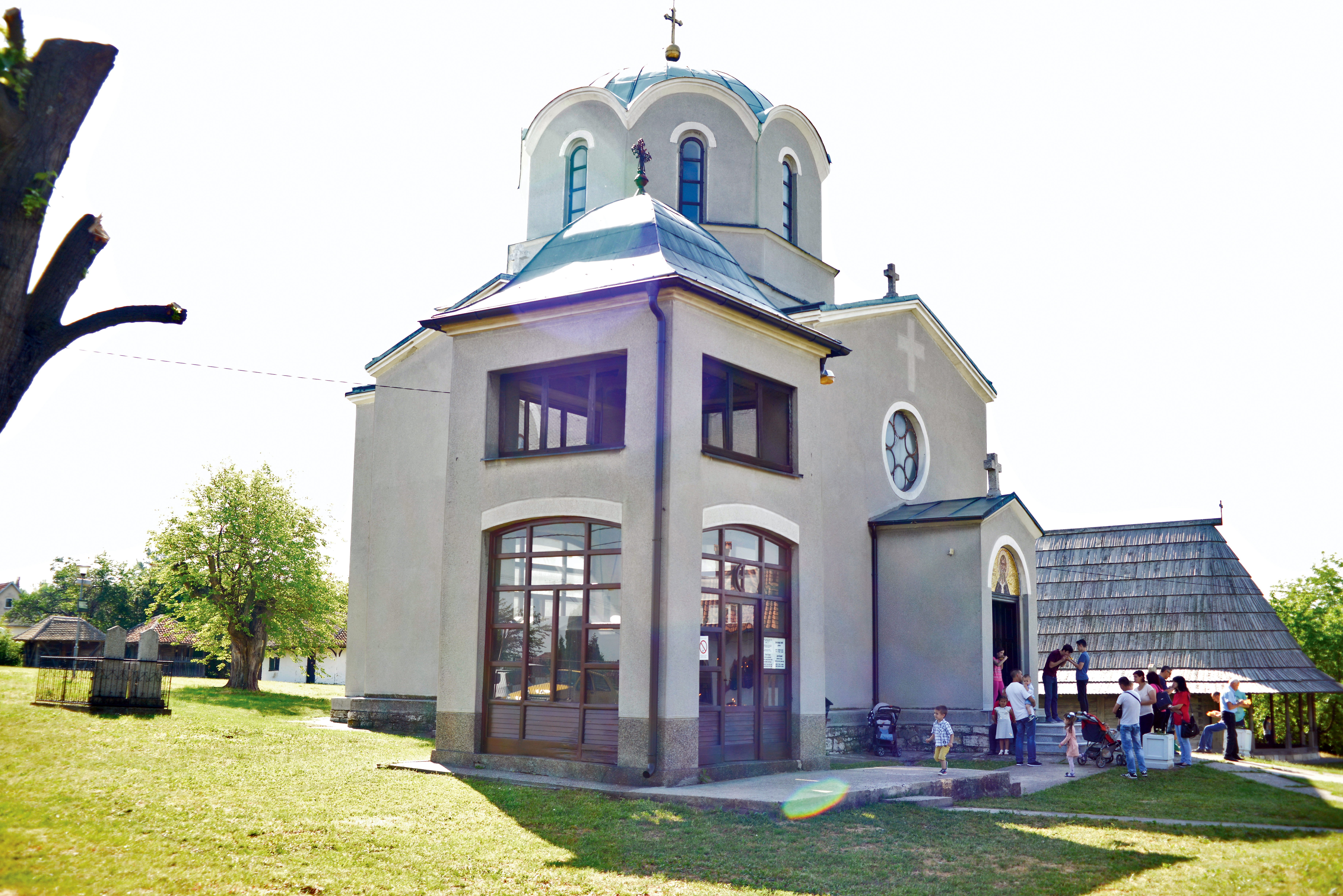 Poseta kompleksu u porti Crkve sv. Ilije u Vraniću tokom projekta "Beogradski bibliotekari o Beogradu"